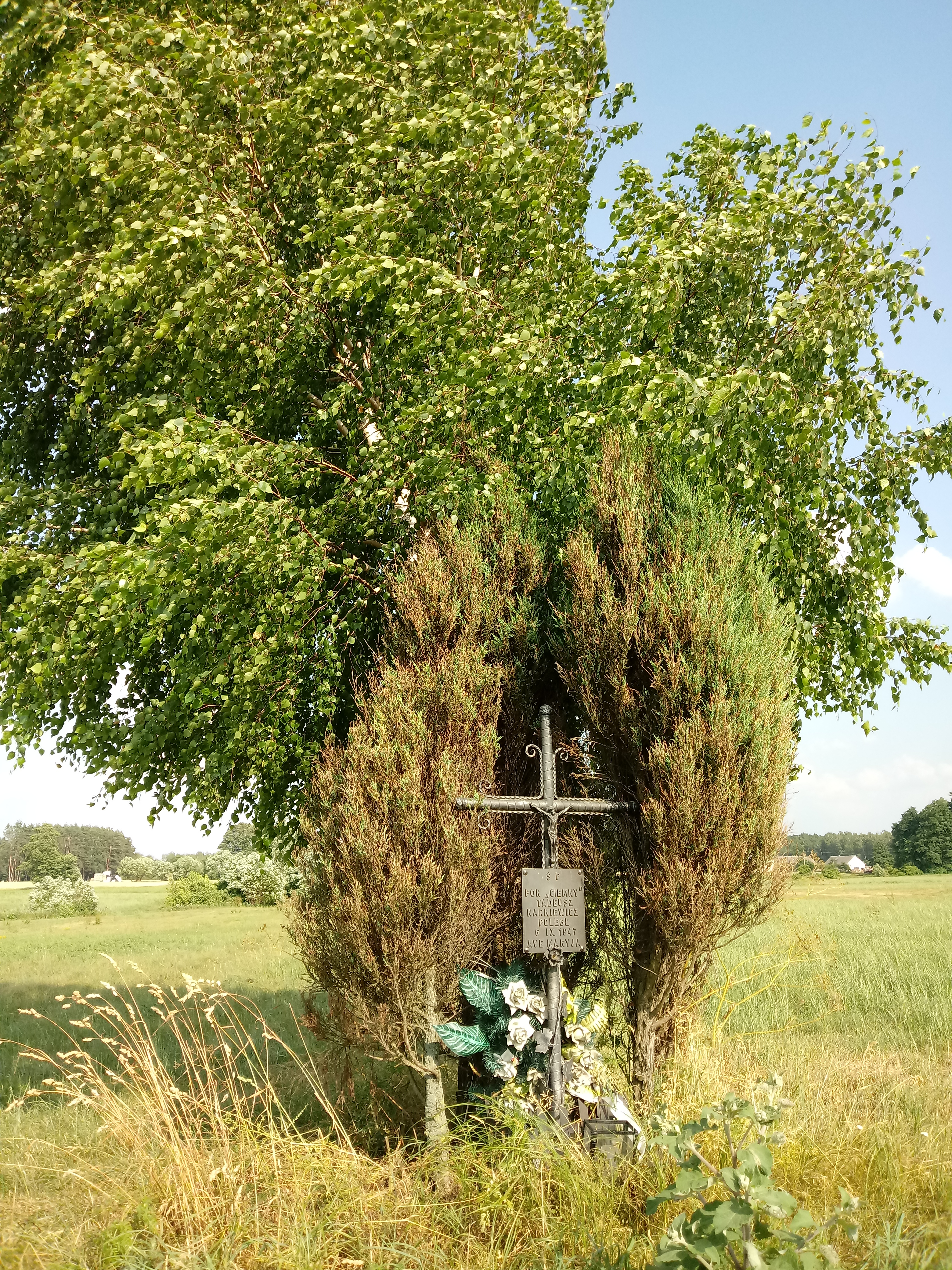 Krzyż pamiątkowy w miejscu śmierci: Por. „Ciemny” Tadeusz Narkiewicz poległ 6 września 1947 roku. Miejsce pochówku nieznane.